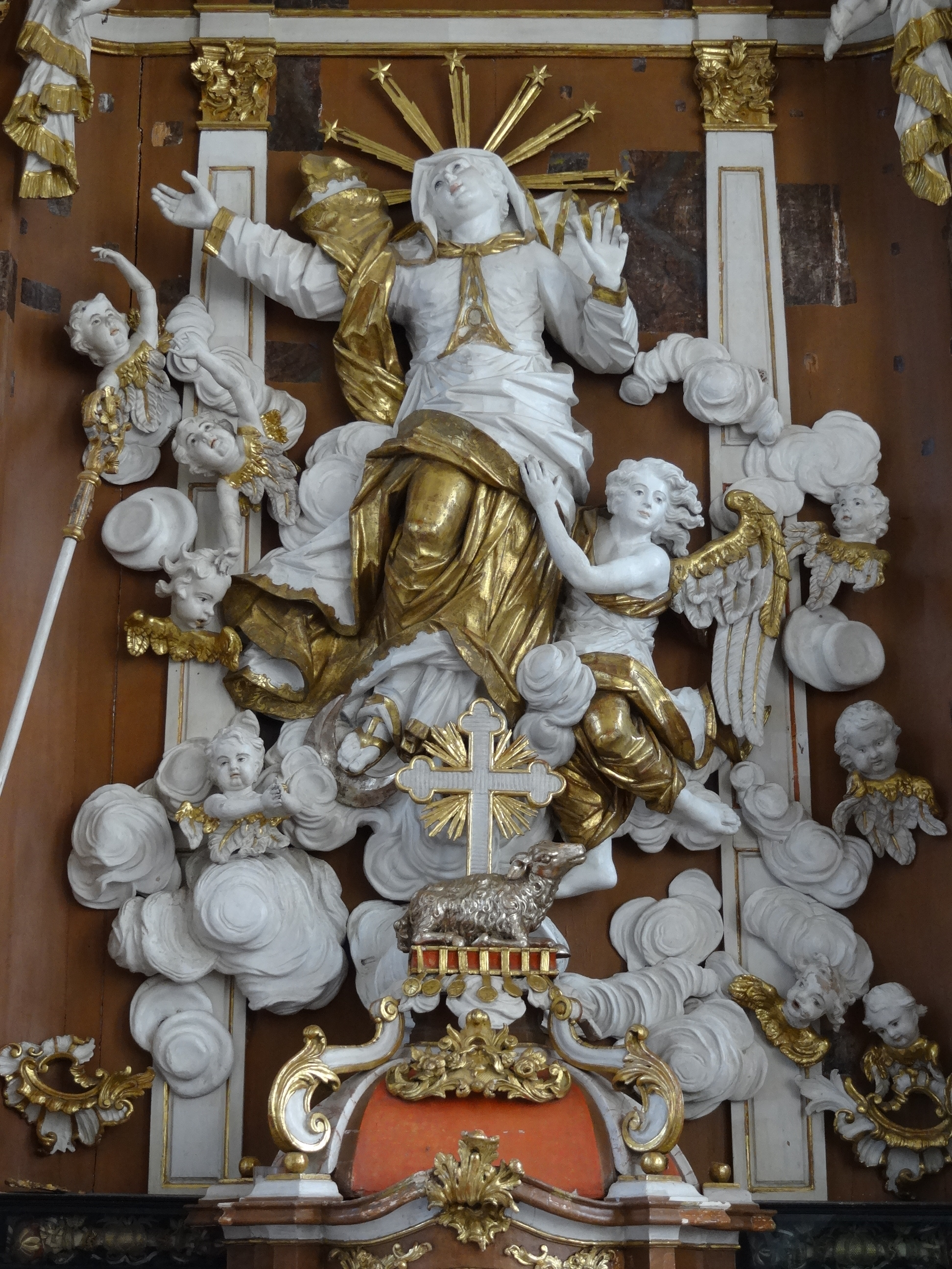 Klosterkirche (JVA Rockenberg)